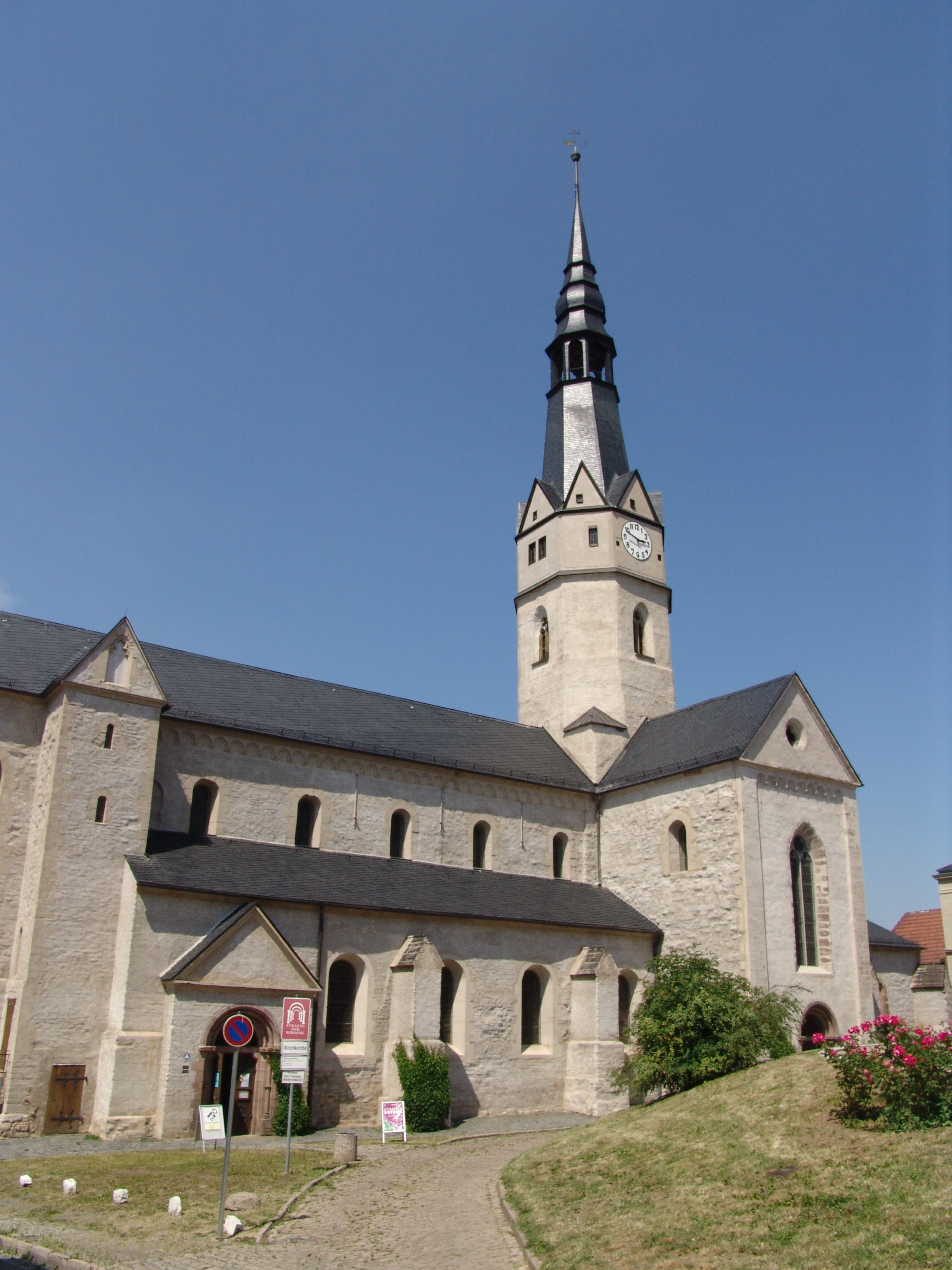 Sangerhausen St. Ulrici church